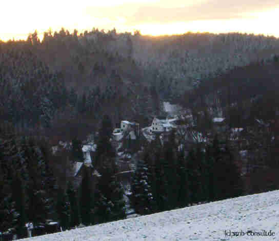 Blick von Berghof auf das winterliche Niedernhagen Autor: Stephan Baum